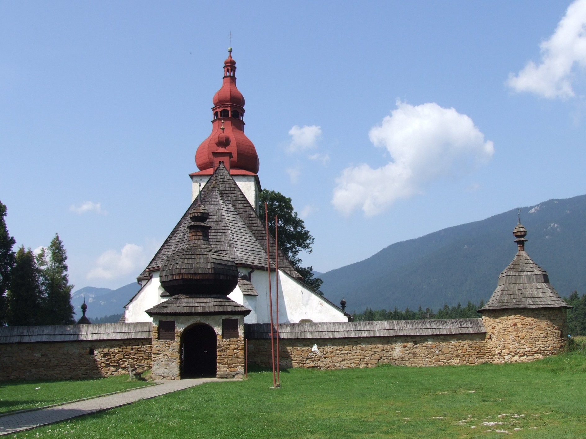 Liptovské Matiašovce (kostol)